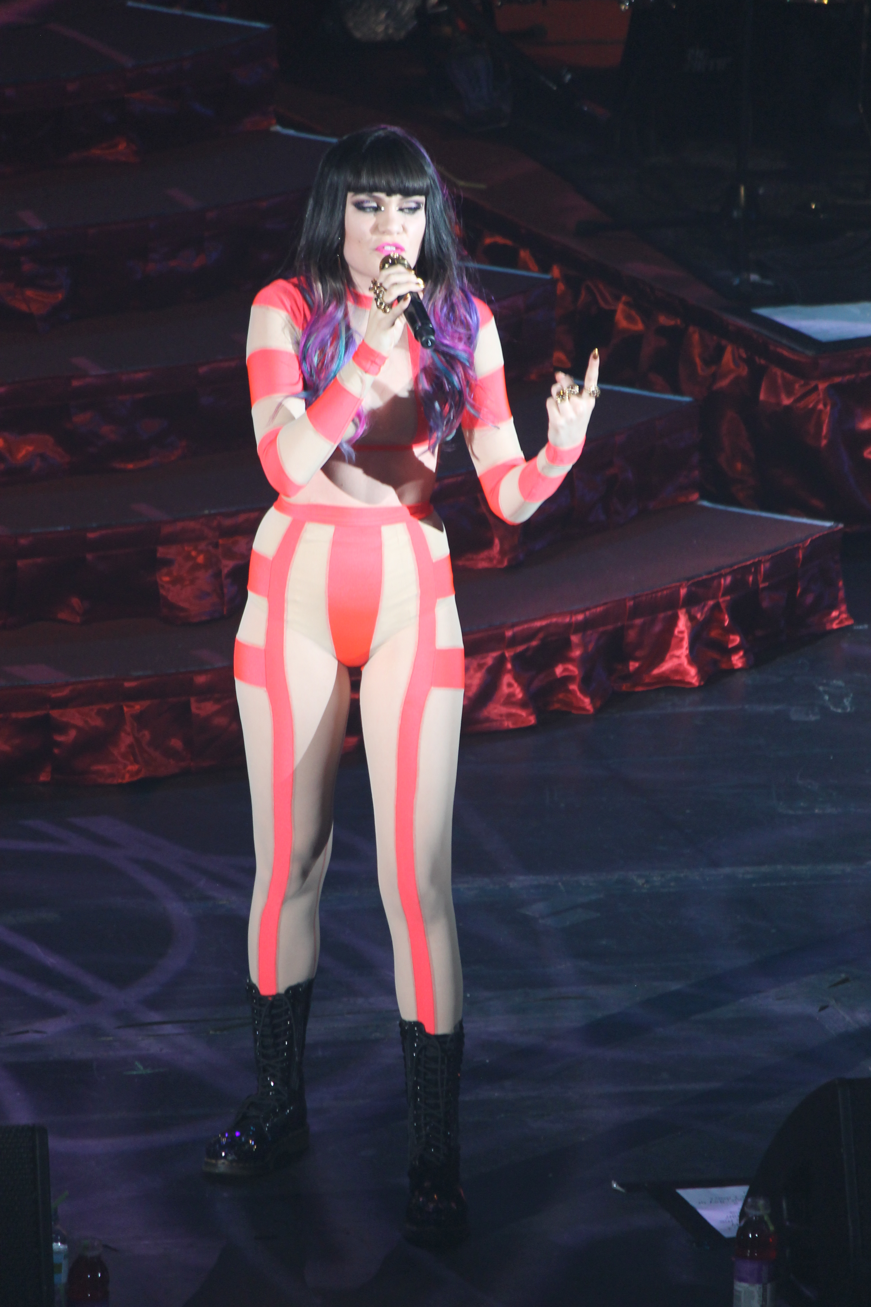 Concierto el 2 de Noviembre en Hammersmith (Londres)